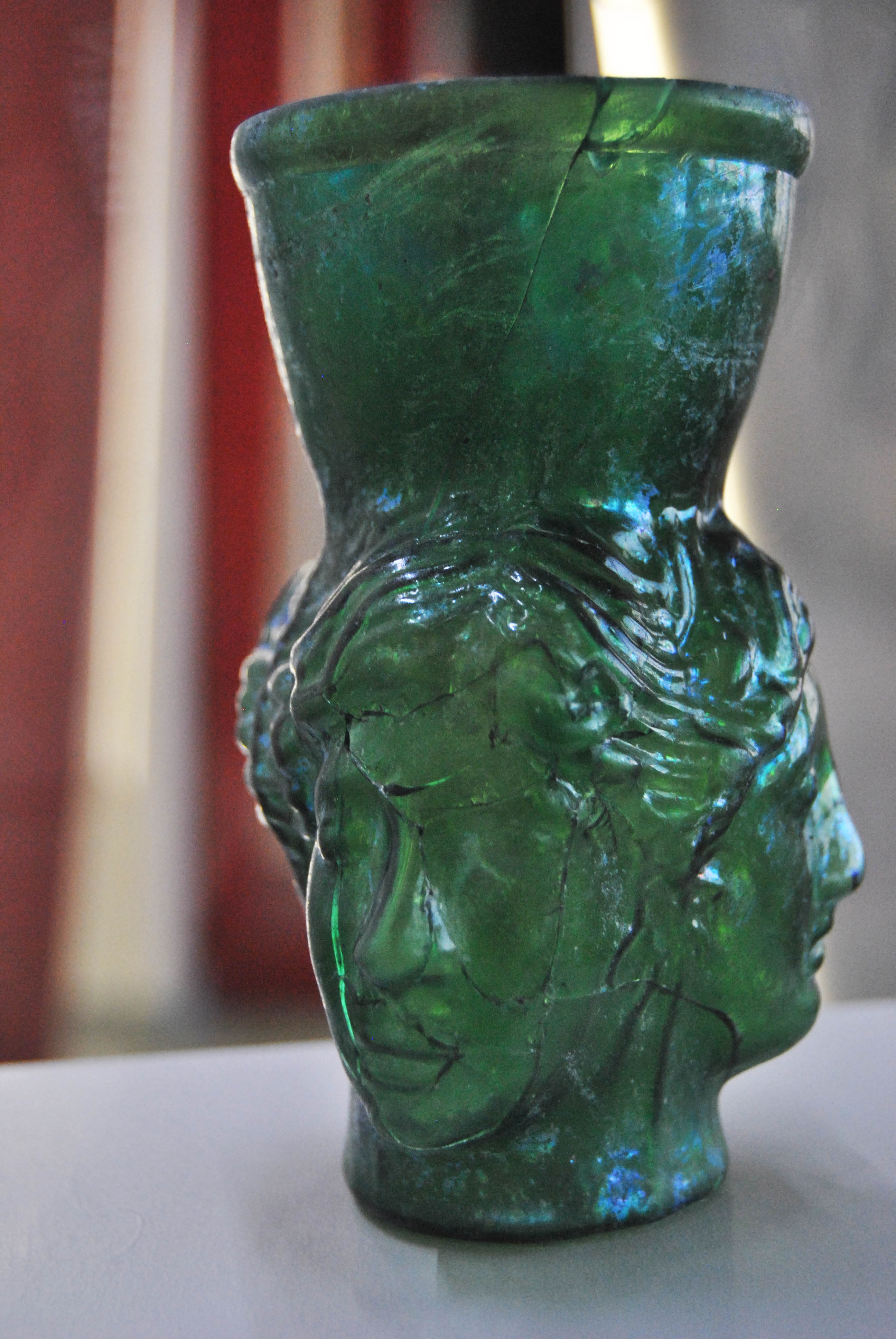 Bicchiere in vetro verde mac vc